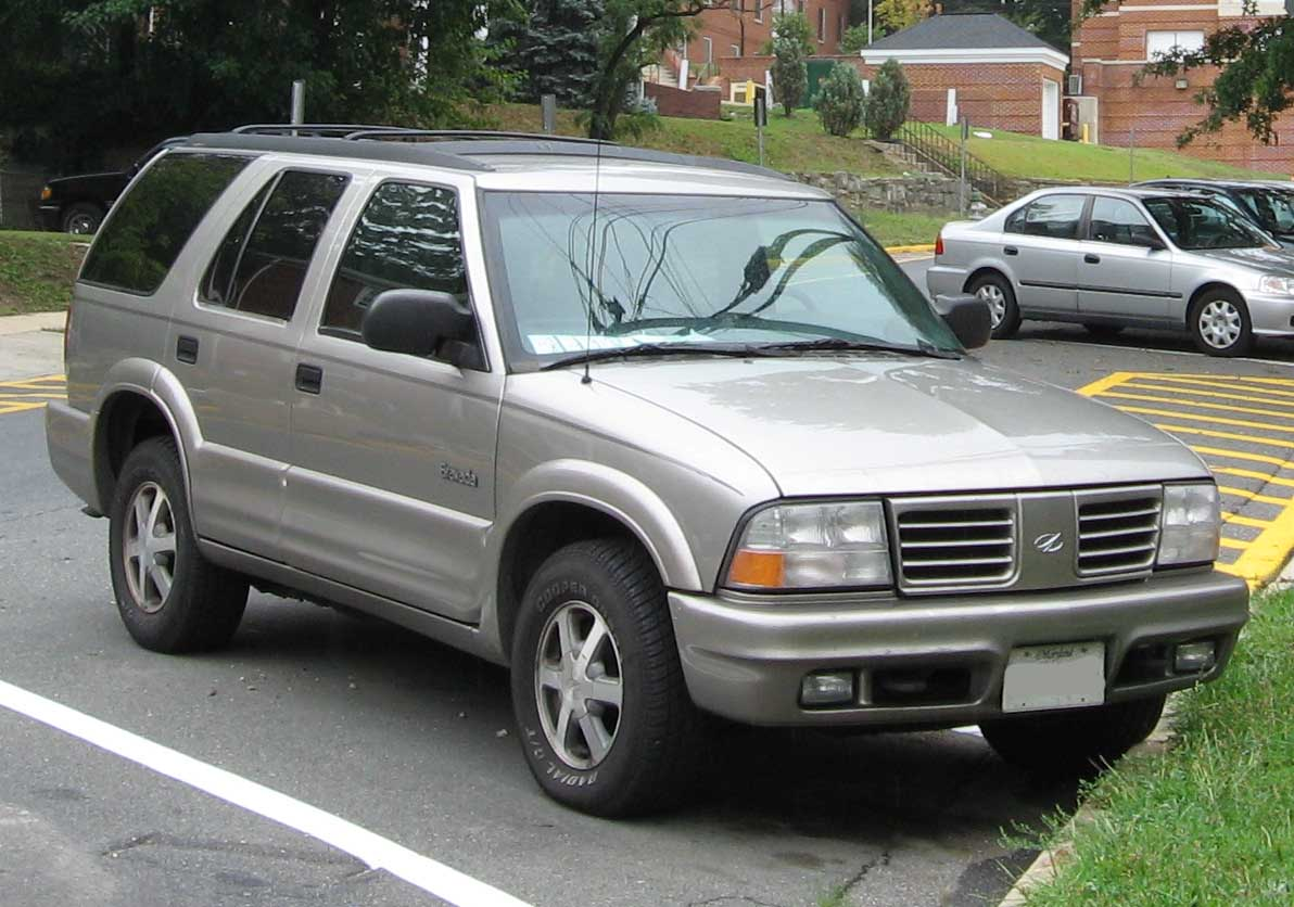 1998-2001 Oldsmobile Bravada photographed in USA.